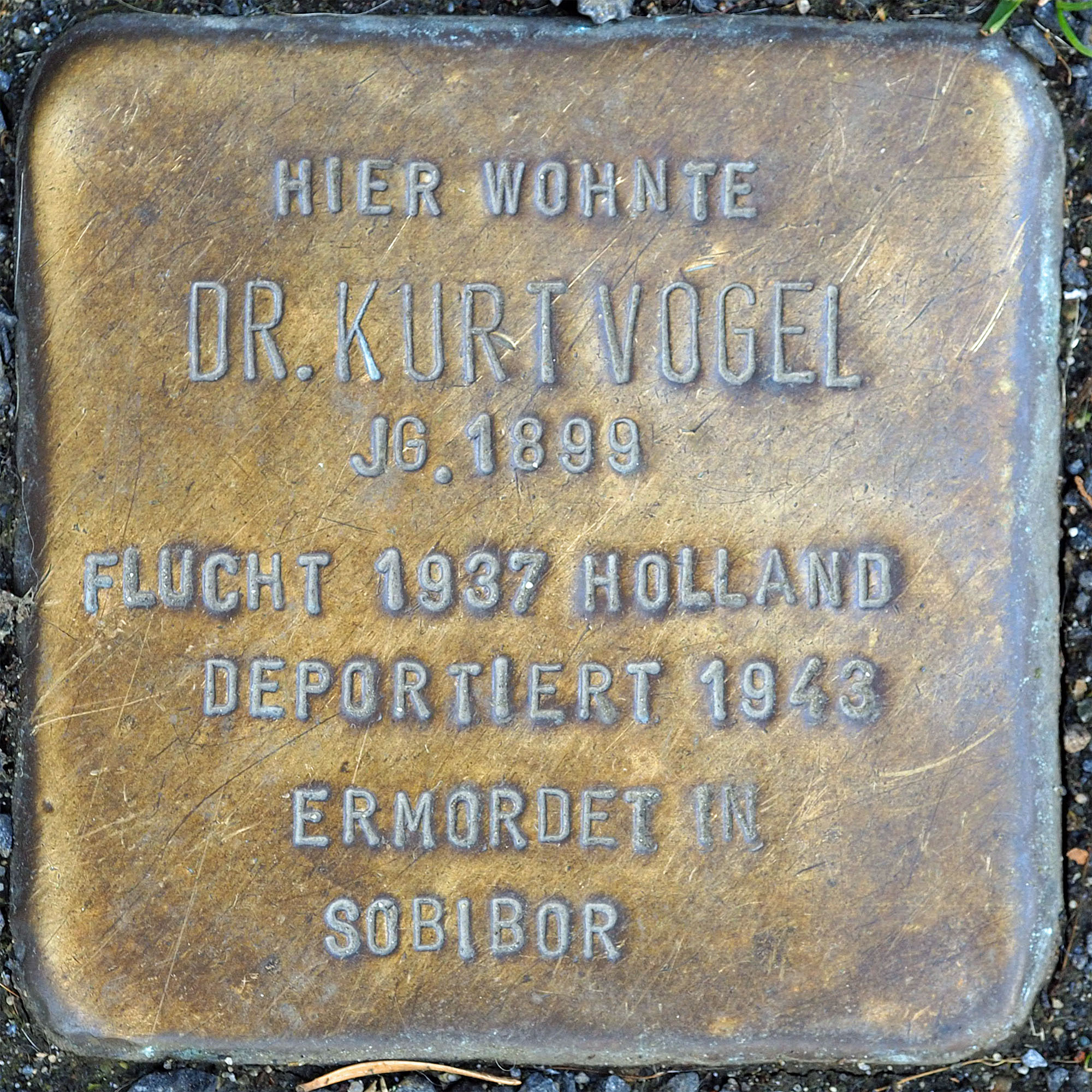 Stolpersteine MG: Vogel, Dr. Kurt